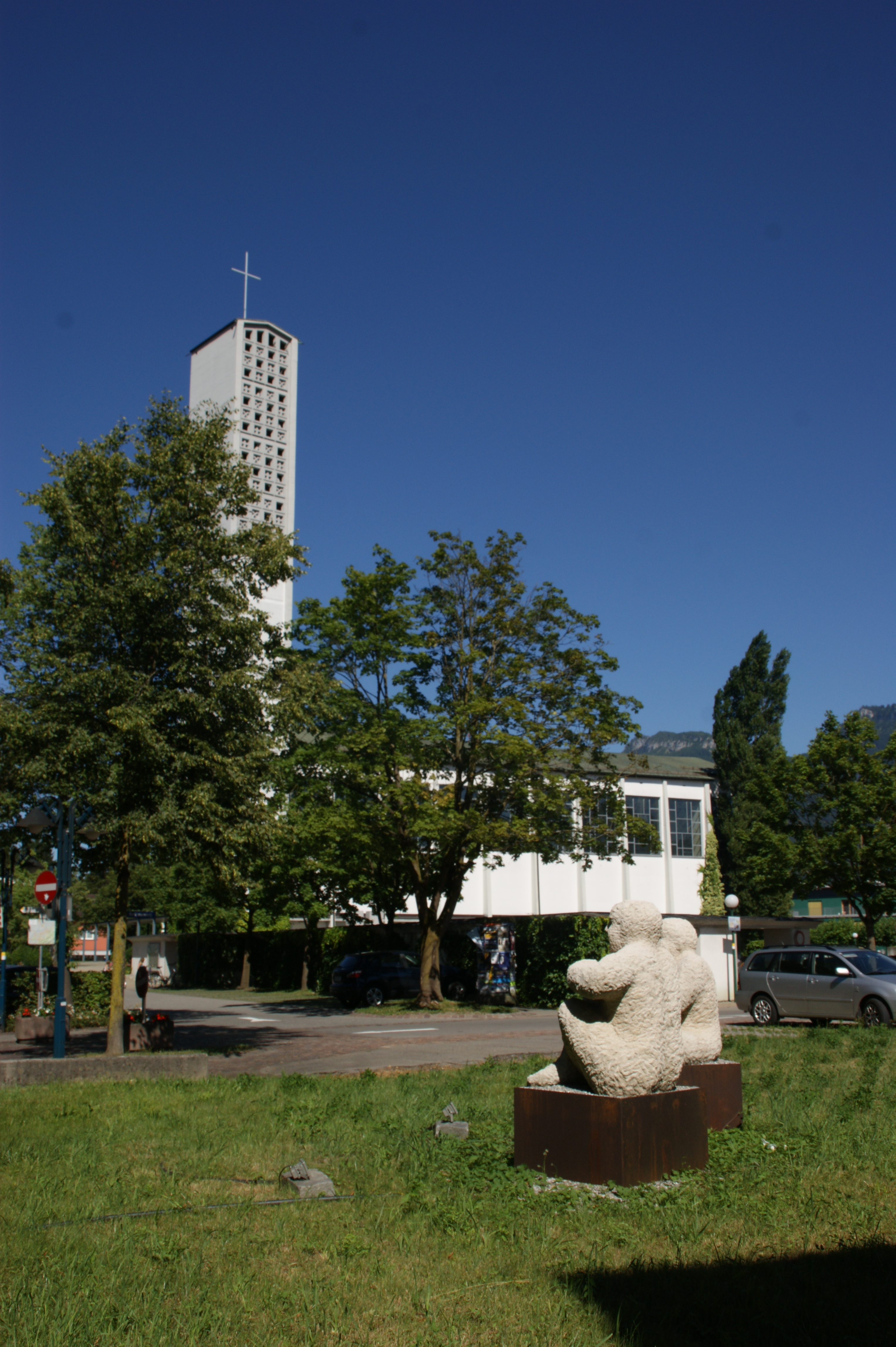 Kath. Pfarrkirche hl. Nikolaus, Altach